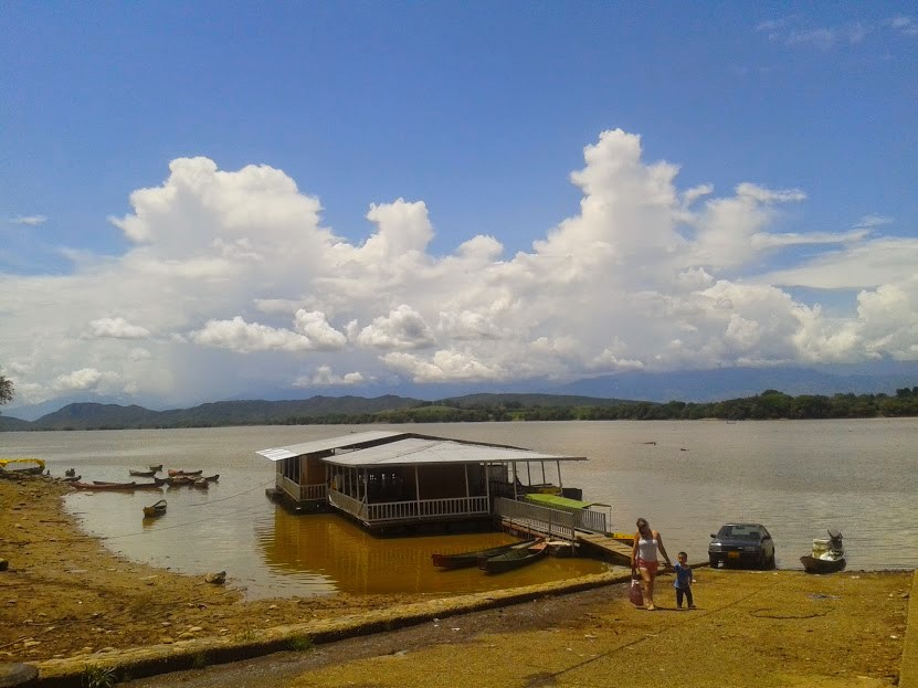 Malecón de Yaguara, Yaguara, Huila. Esta fotografía fue tomada en el municipio colombiano con código 41885.